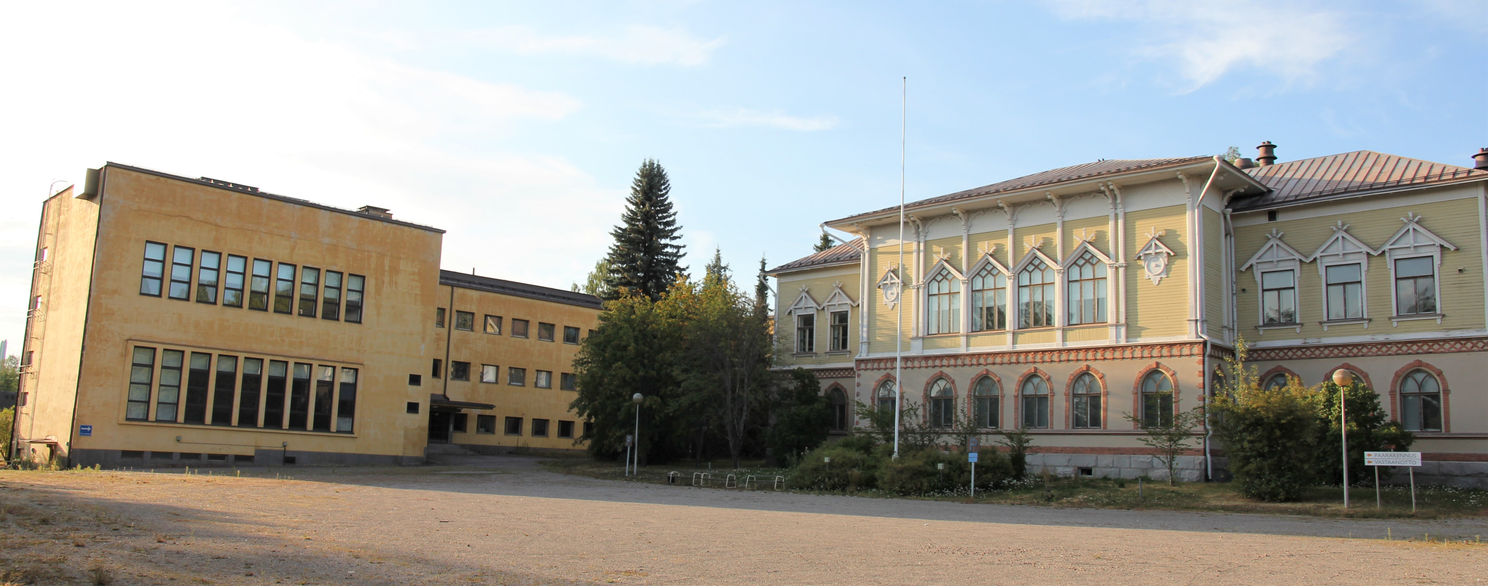 Heinolan seminaarin Uusi päärakennus (Toivo Salervo, Martti Välikangas, Väinö Vähäkallio ja Selim Savonius, 1939; laajennus 1952) ja Vanha päärakennus (ark. Jac Ahrenberg, 1901). Rakennukset sijaitsevat osoitteessa Lampikatu 5, joka on Heinolan Seminaarin kaupunginosaa. Lisätietoa mm. Heinolan seminaari. Rakennushistoriallinen selvitys 24.5.2013.